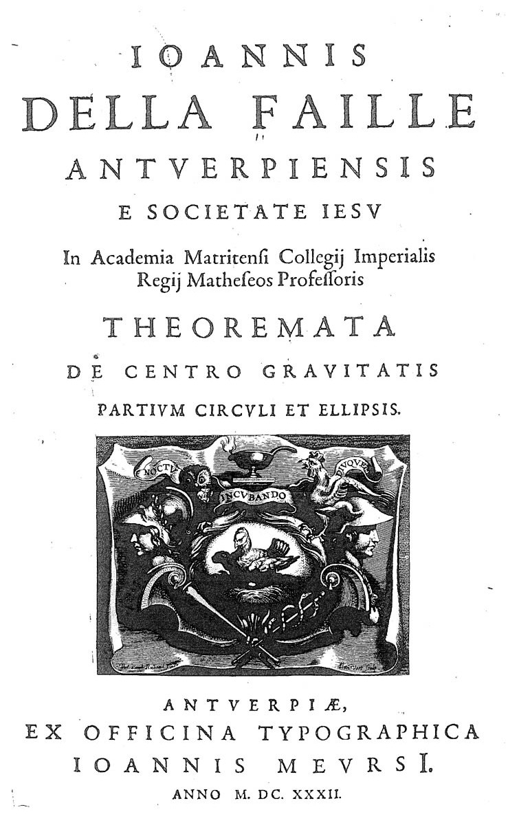 Frontespizio